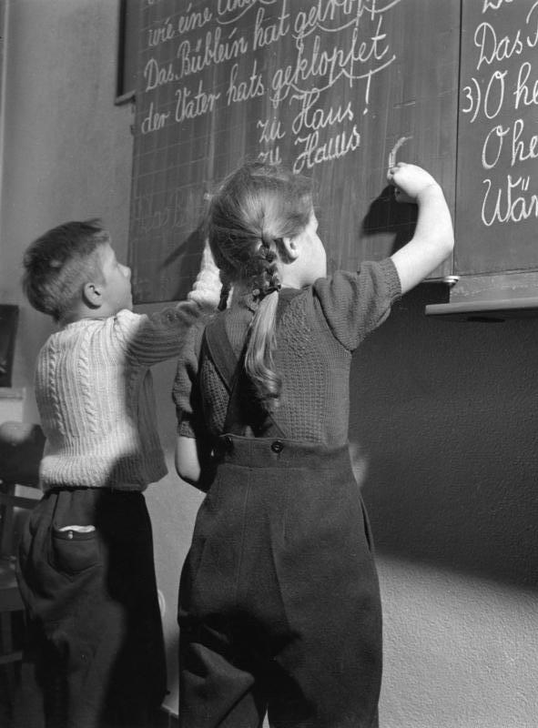 Neue Münsterschule in Bonn An der großen Tafel lernen die ABC-Schützen die ersten Sätze schreiben Information added by Wikimedia users.